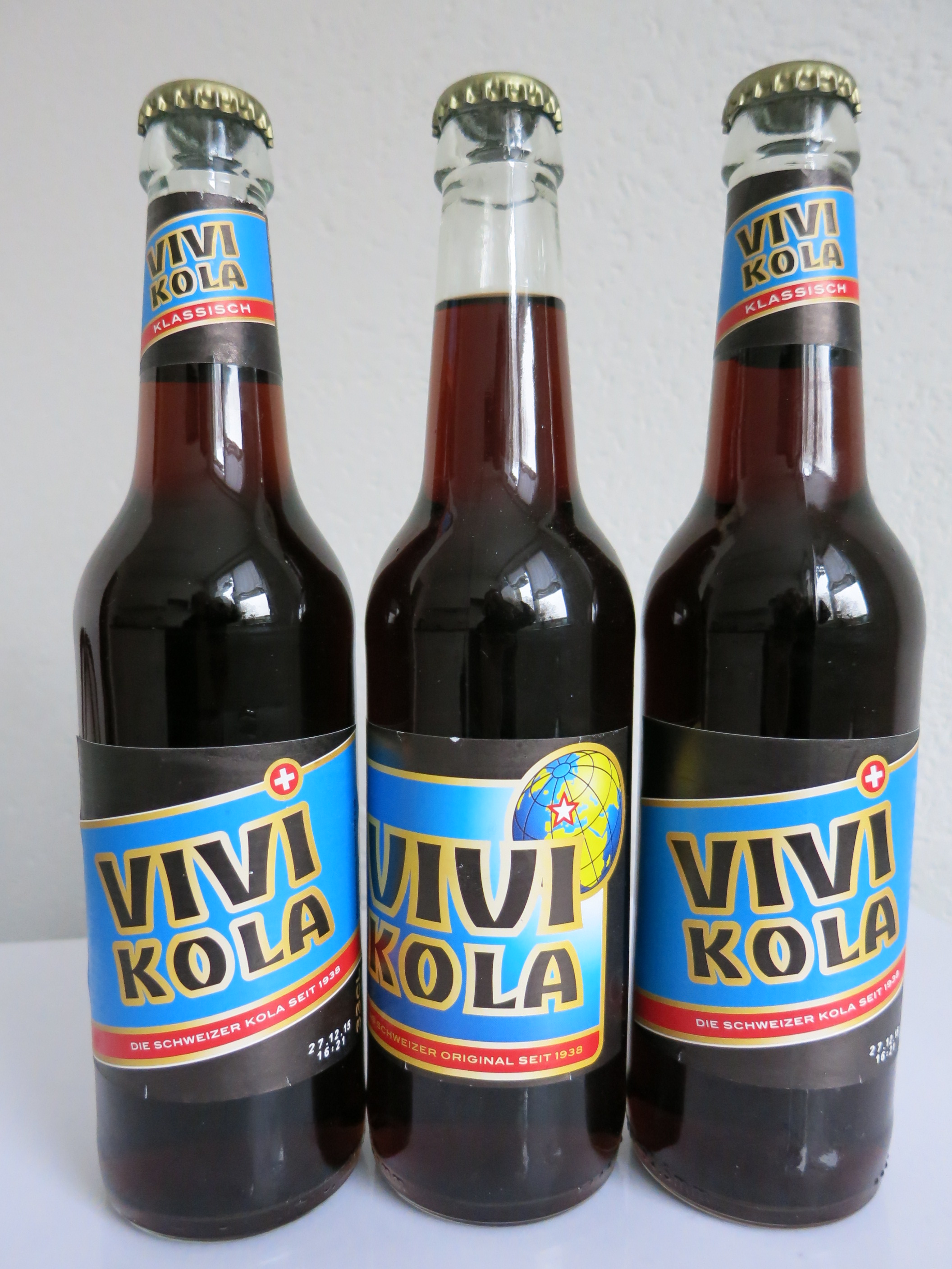 Vivi Kola, Eglisau ZH, Schweiz